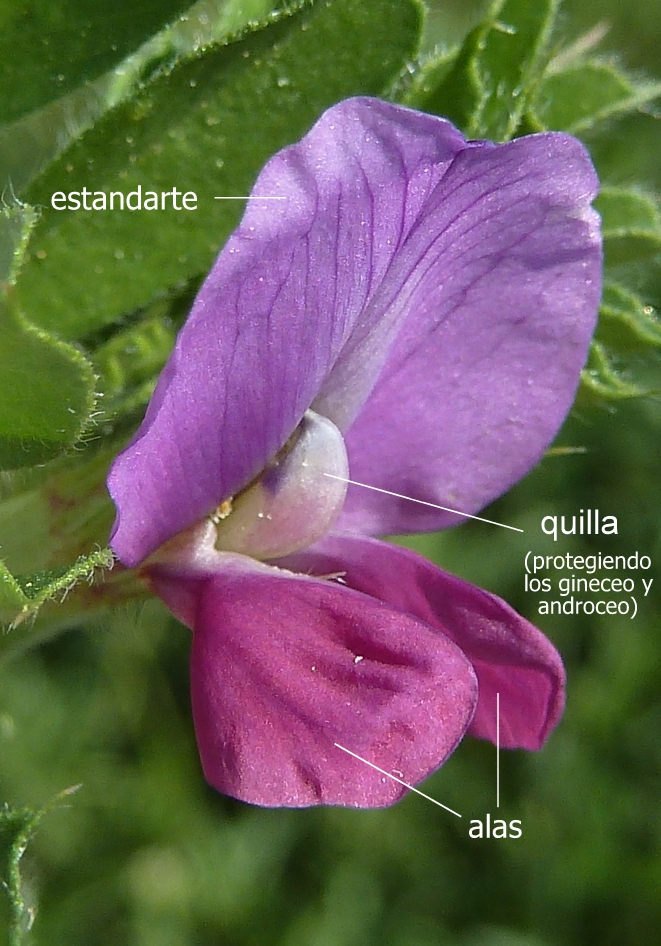 Componentes de la corola de una flor de Faboideae (Papilionoideae); vista fronto-lateral. (Vicia sativa, La Huerta, Albatera, Alicante, España)